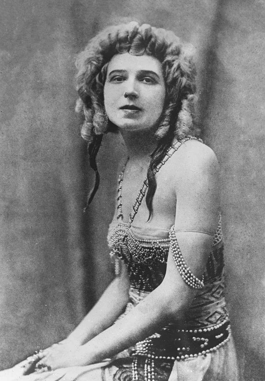 Mme Ida Rubinstein : [photographie de presse] / [Agence Rol]